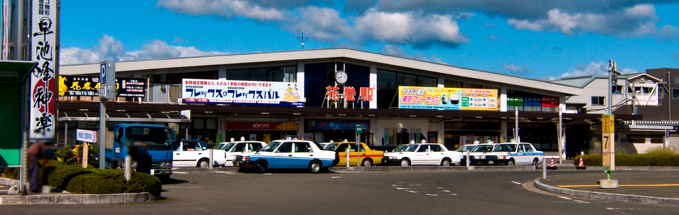 東日本旅客鉄道株式会社東北本線・釜石線花巻駅駅舎